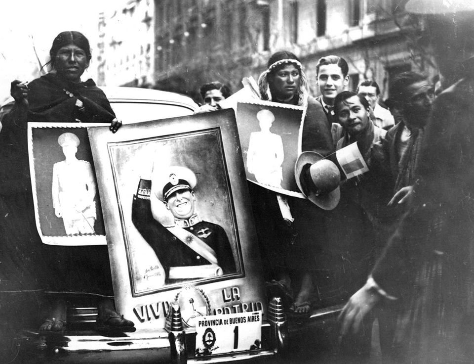 Malón de la Paz entrando a Buenos Aires. Grupo de kollas que desde Abra pampa (Jujuy) iniciaron el 15 de mayo de 1946 la marcha hacia Buenos Aires, para reclamar al Presidente Perón por las tierras usurpadas. Arribaron a la capital el 3 de agosto del mismo año.